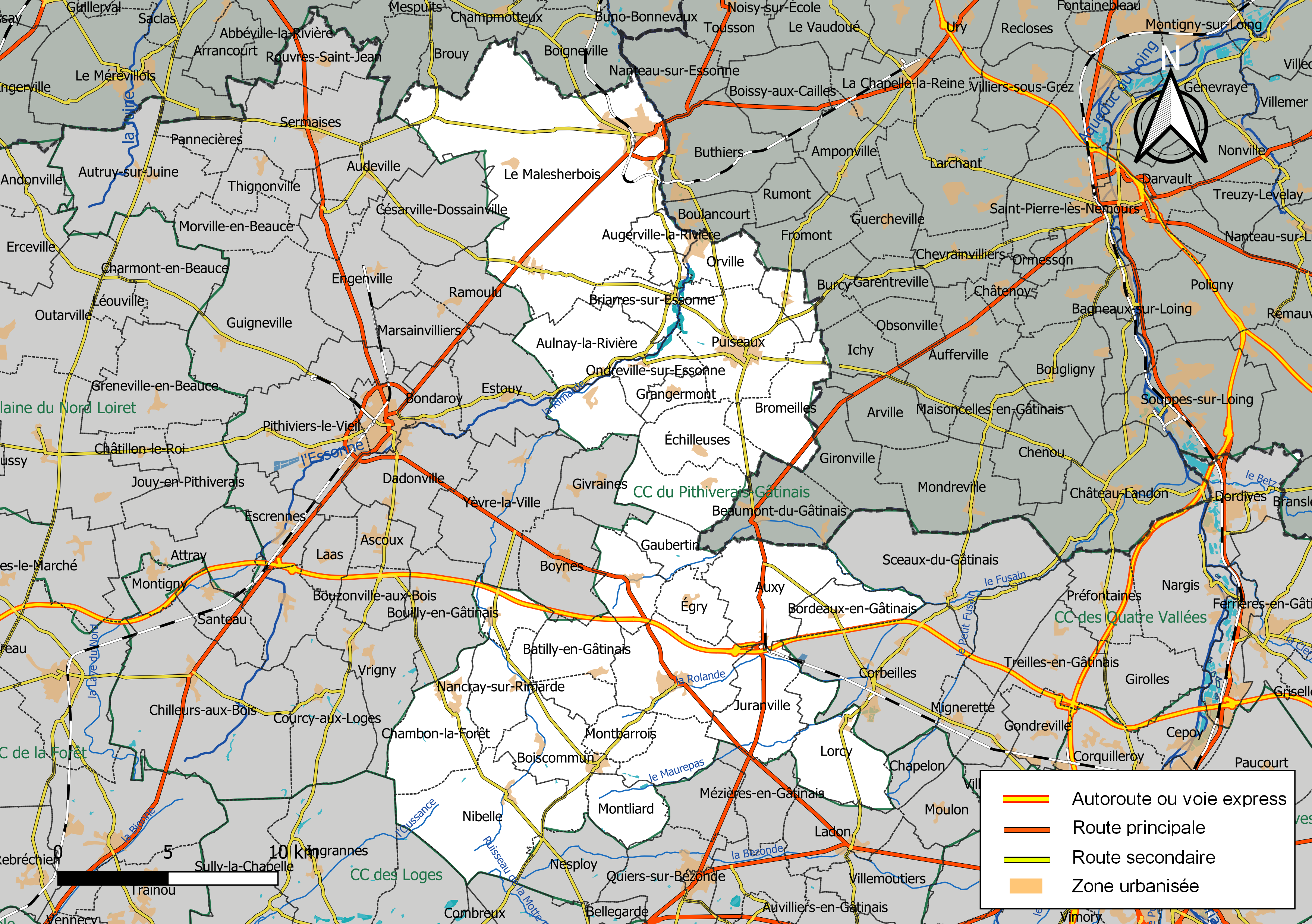 Carte géographique de la communauté de communes du Pithiverais-Gâtinais, département du Loiret, France. Composition au 1er janvier 2019.